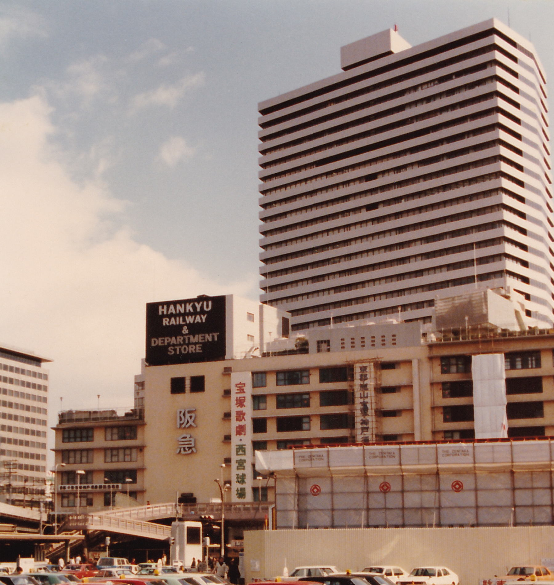 阪急梅田駅と阪急百貨店（1979年）